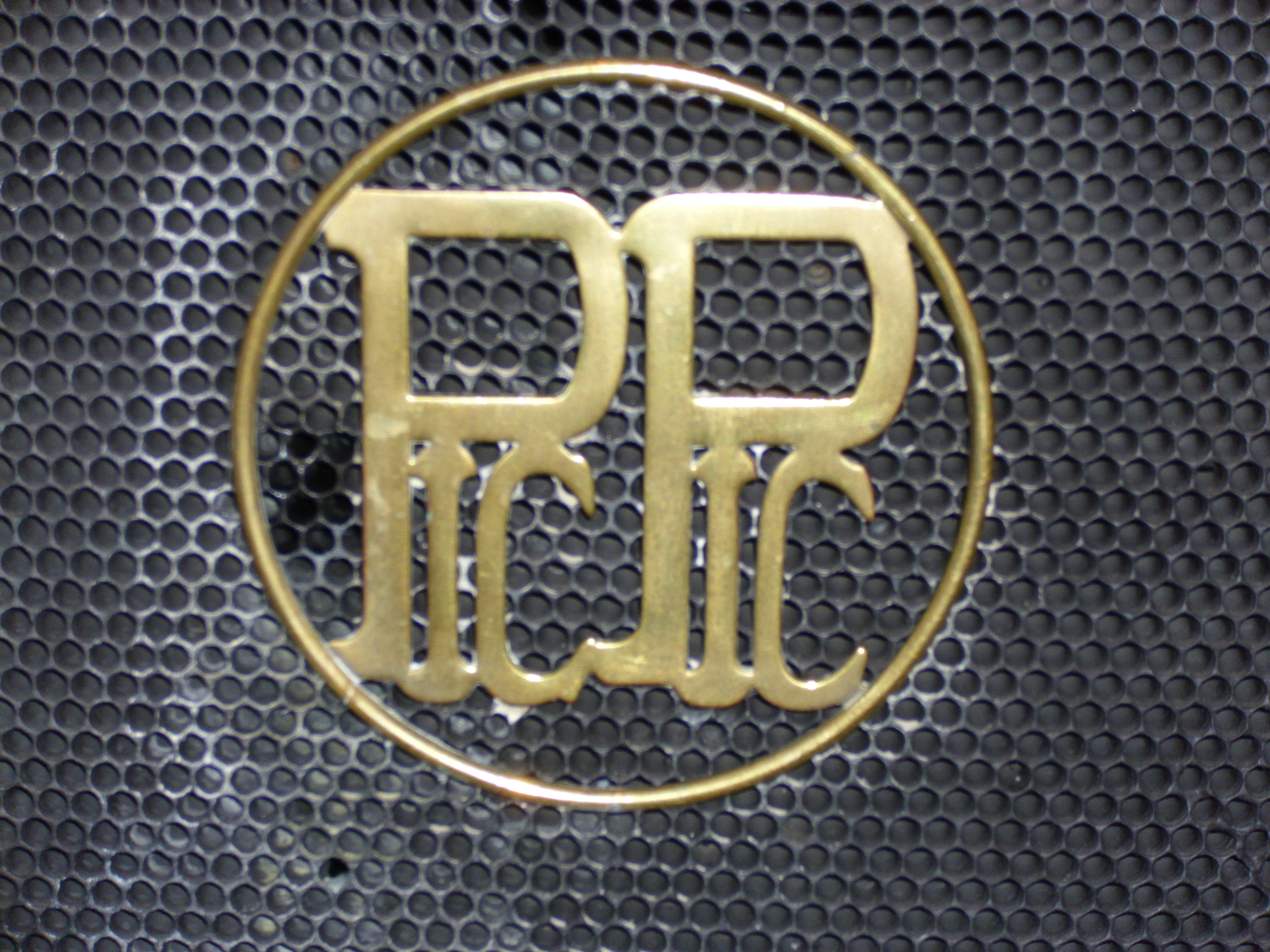 Emblem Pic-Pic